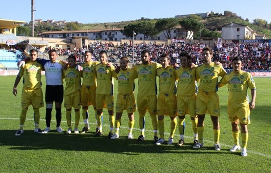 Società Sportiva Scafatese Calcio, 2008-2009